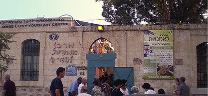 תמונת המרכז